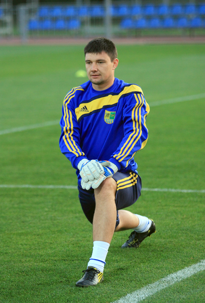 Максим Старцев